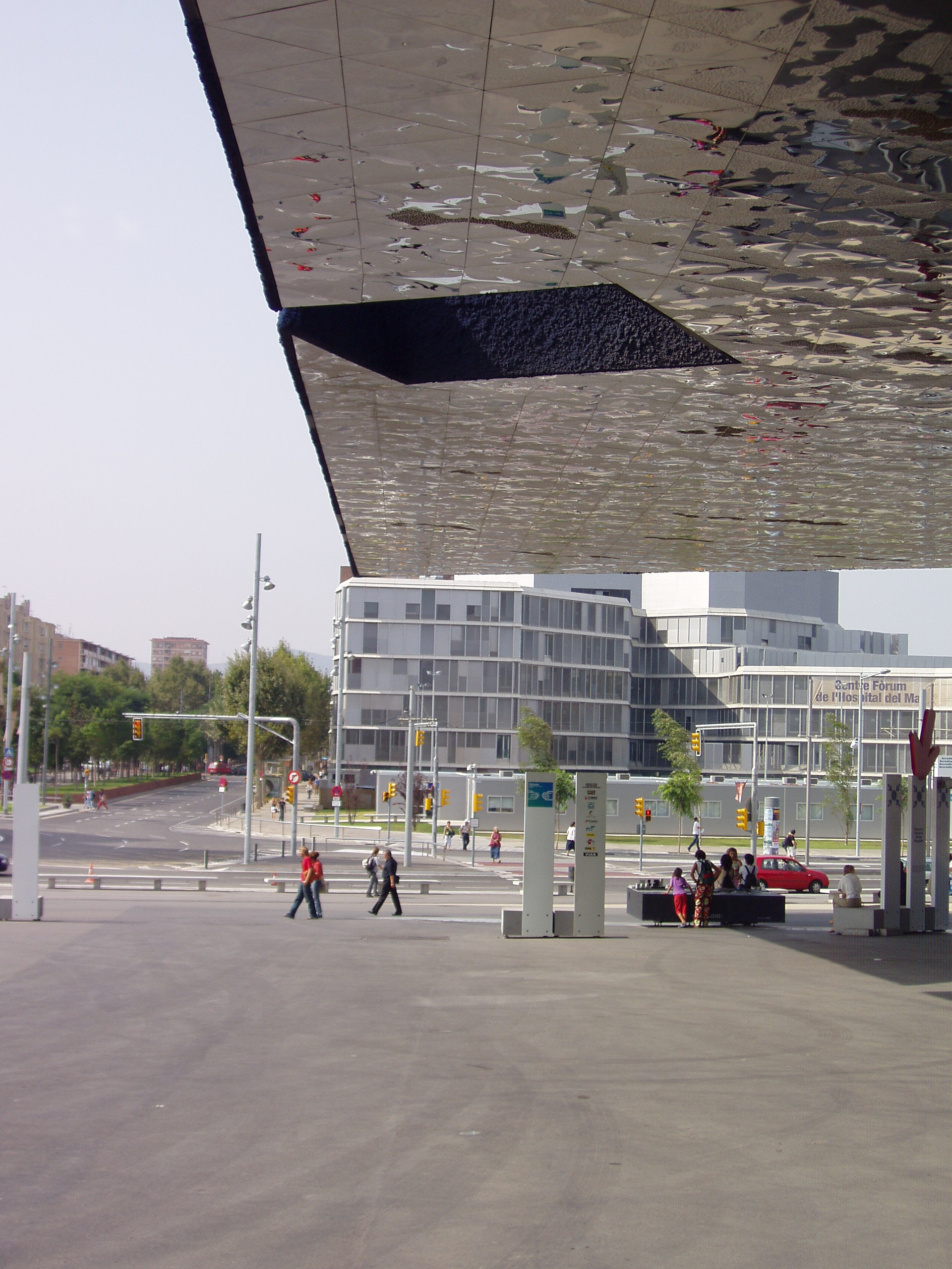 Vor dem Haupteingang zum Forum Universal de les Cultures in Barcelona. Das blau-silberne Gebäude ist das dreieckige Kongresszentrum von Herzog & De Meuron. Barcelona, 09.09.2004